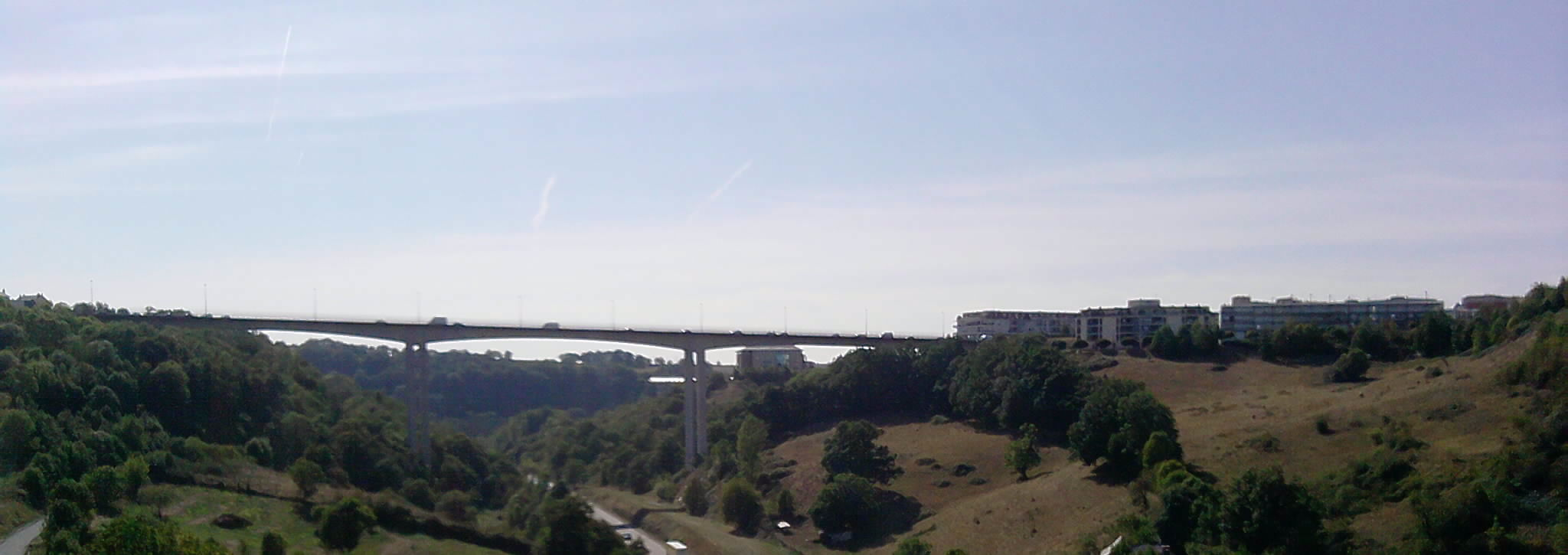 Viaduc de l'Europe, et le quartier de Bourran sur la droite de la photo.